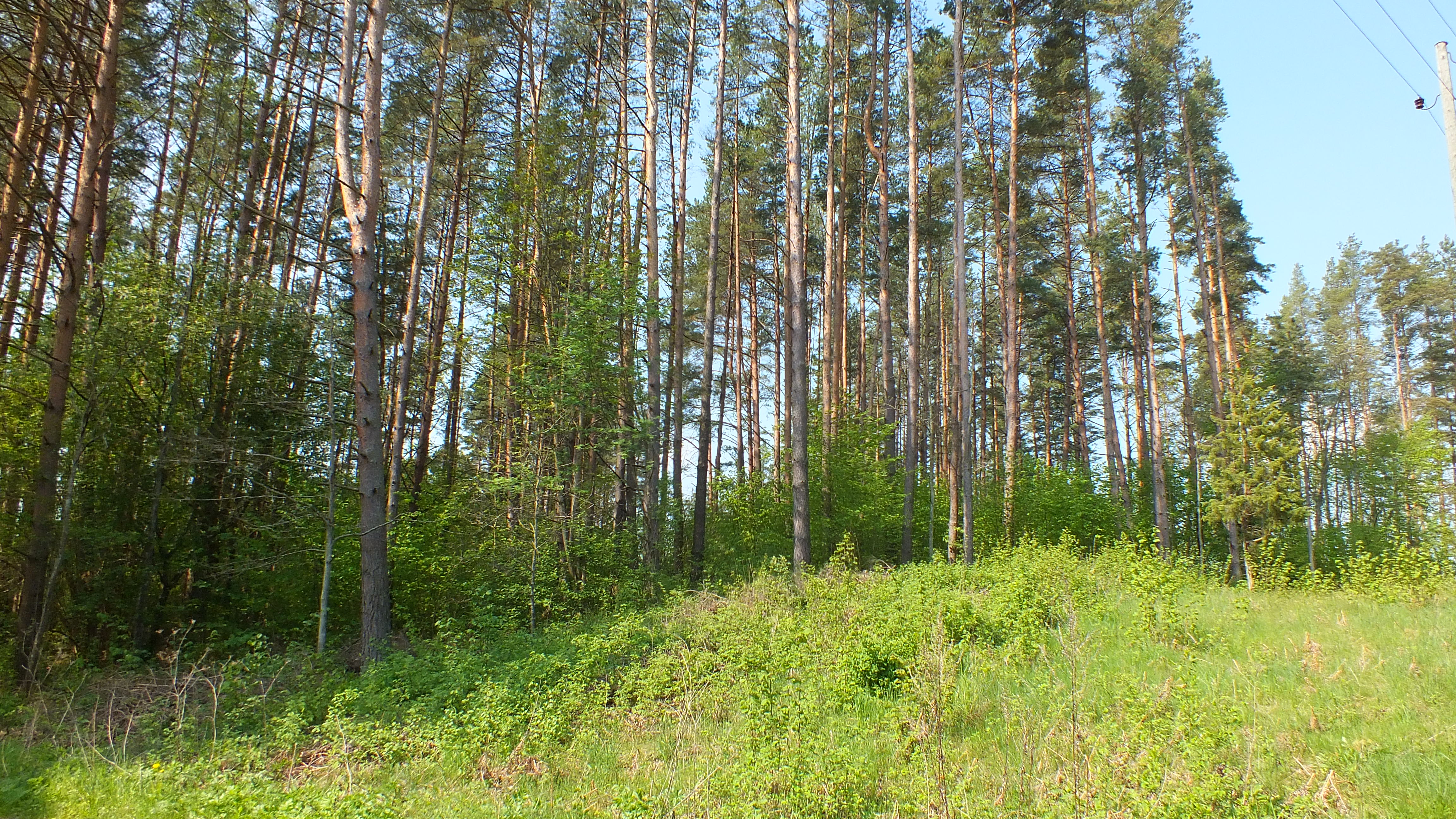 Tojātu apmetne un senkapi